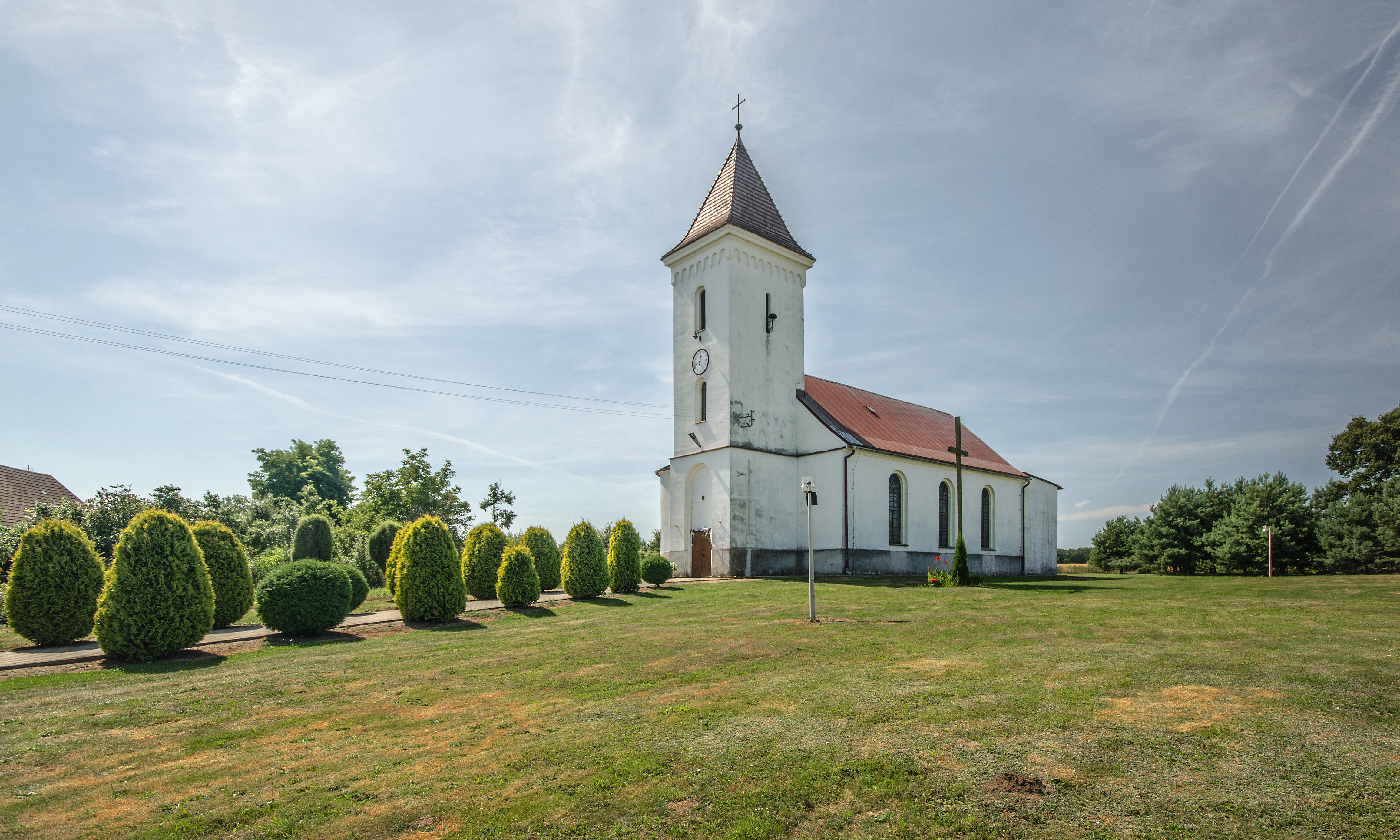 Kościół Matki Boskiej Częstochowskiej w Wielkiej Lipie, powiat trzebnicki, gmina Oborniki Śląskie